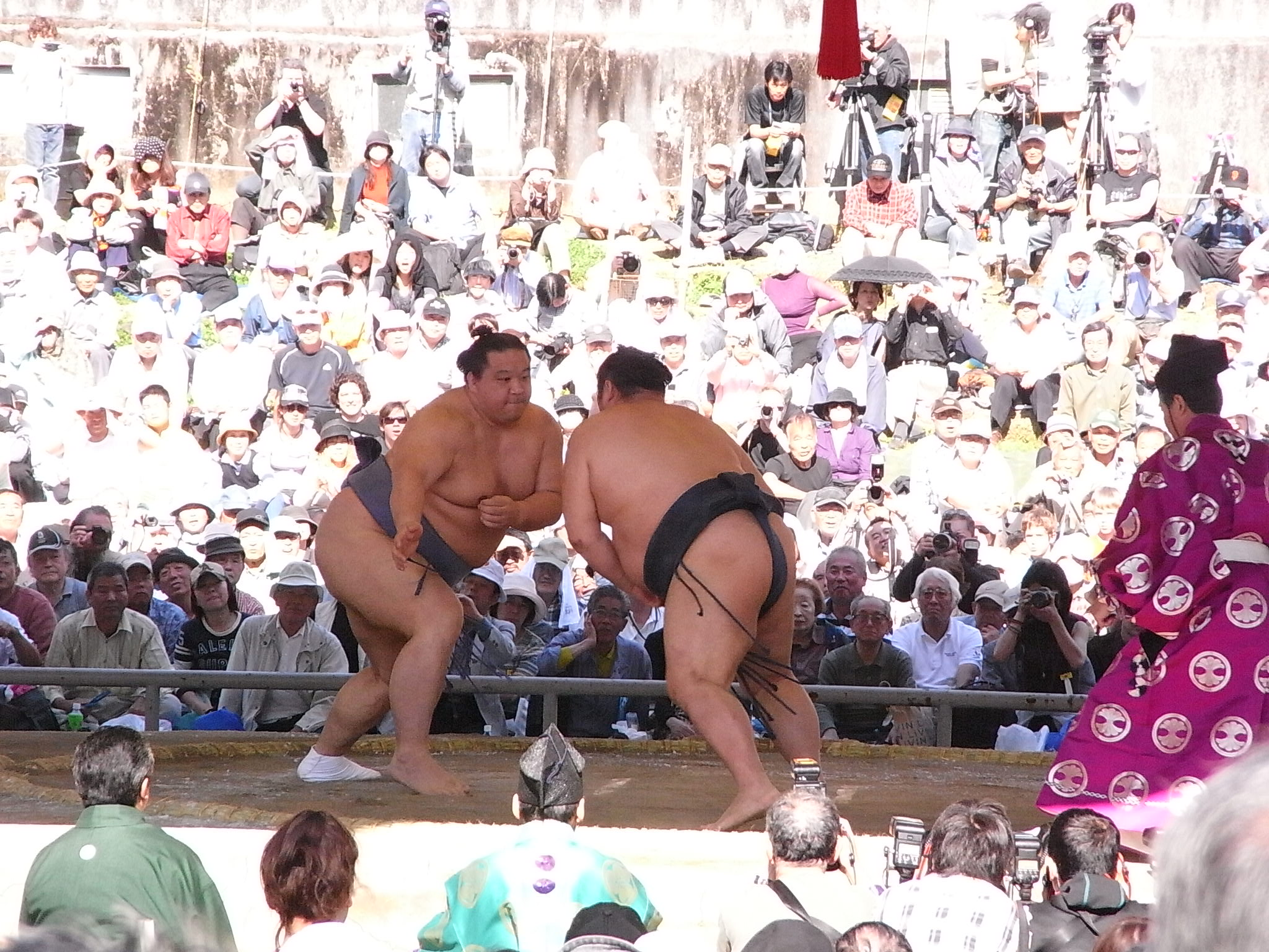 魁皇博之関